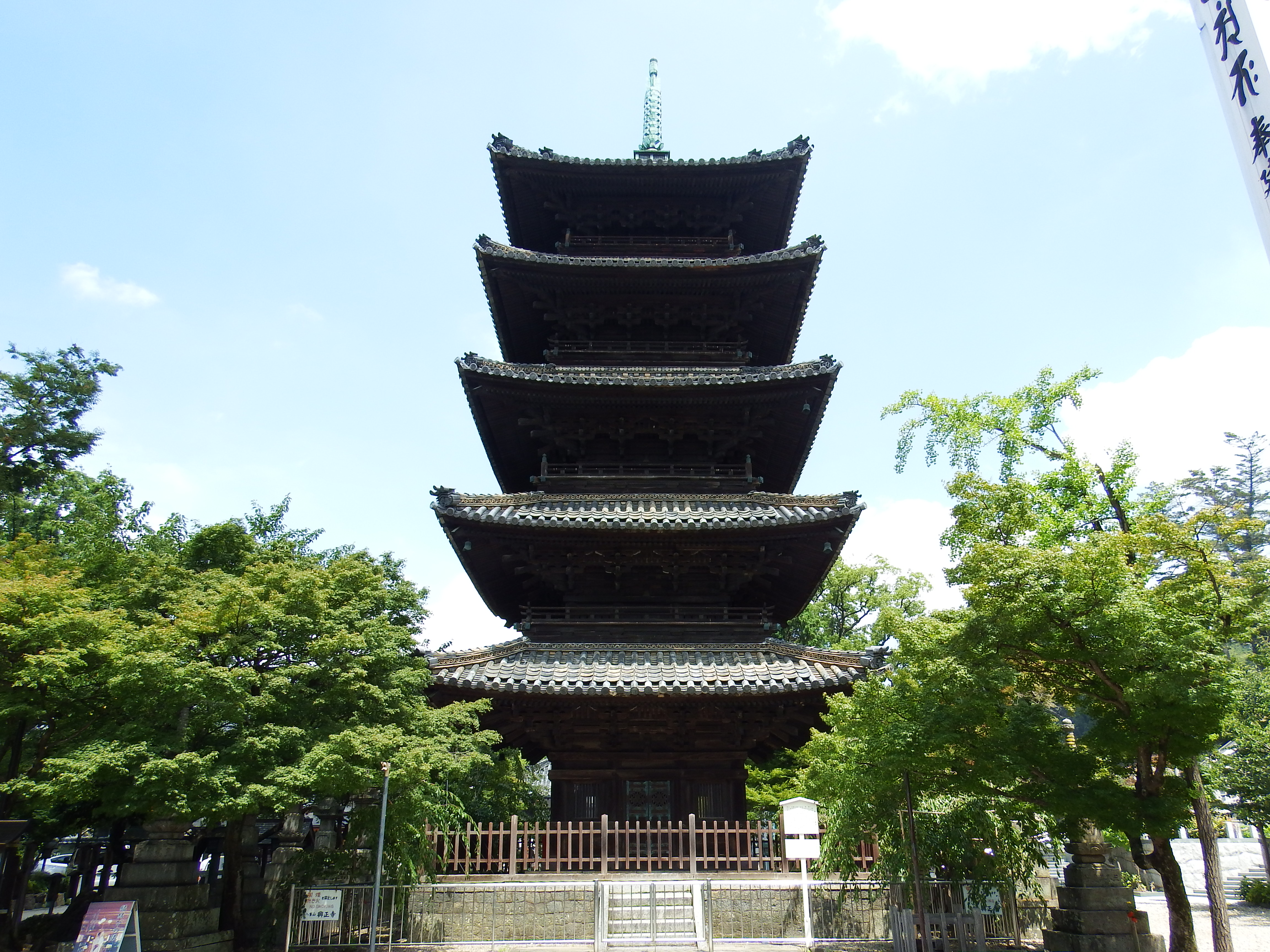 興正寺五重塔